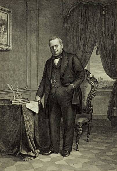 "Ritratto di Camillo Benso conte di Cavour", ridotto, incisione su carta